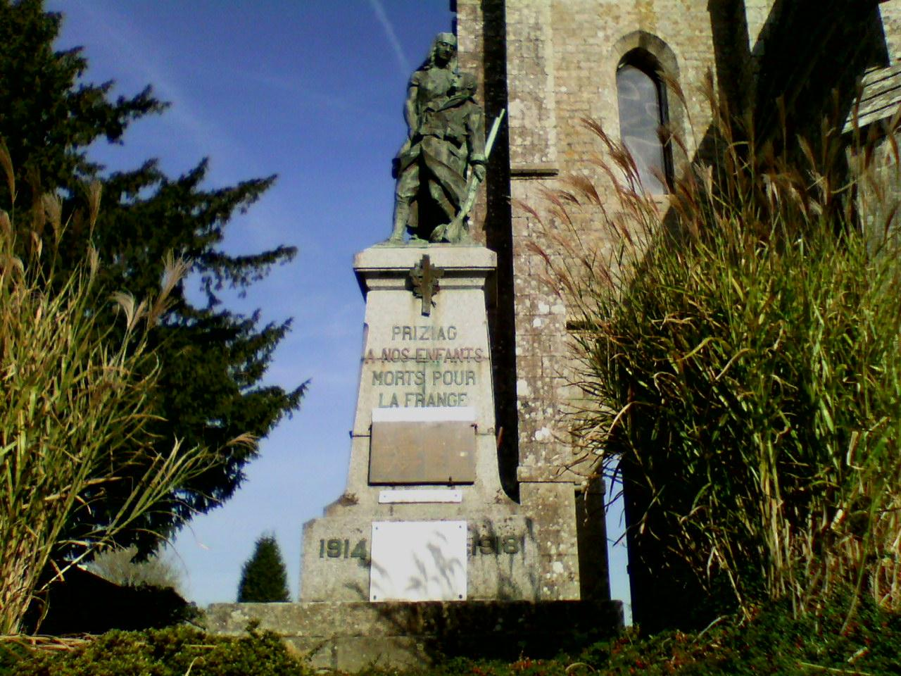 Priziac monument aux morts par le sculpteur Gaston-Auguste Schweitzer avec socle